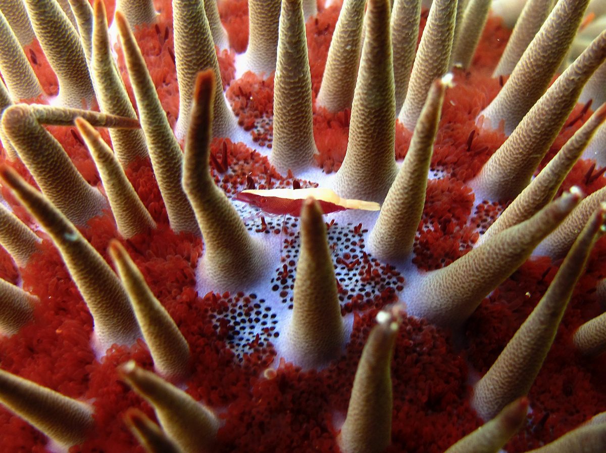 Une crevette symbiotique Periclimenes soror sur une étoile épineuse Acanthaster planci, à la Réunion.